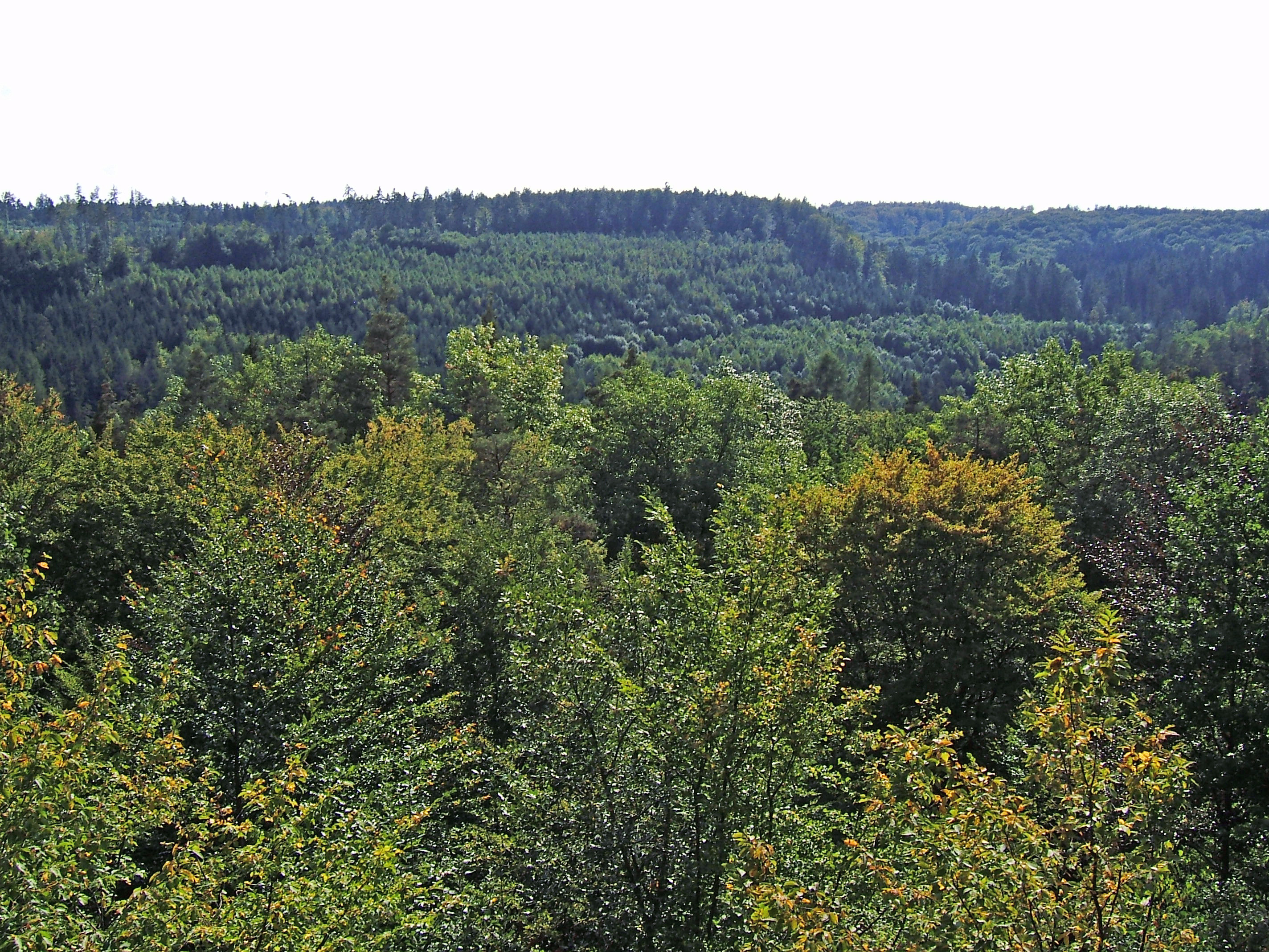 View from Falkenkopf, Schoenbuch